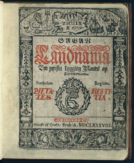 Lándnámabók Skalhollte: H. Kruse, 1688